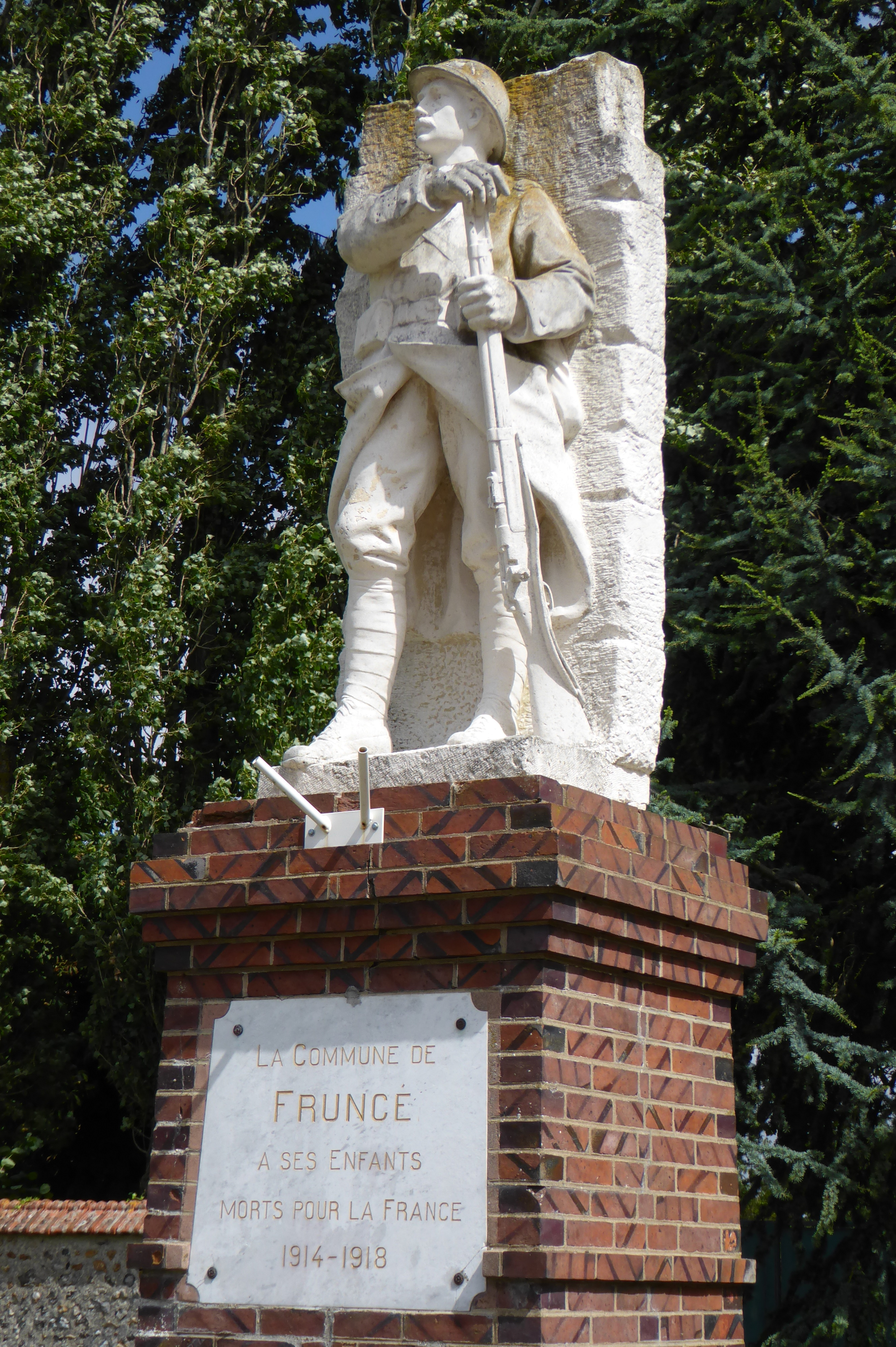 Monument aux morts de Fruncé par Félix Charpentier, Eure-et-Loir (France).